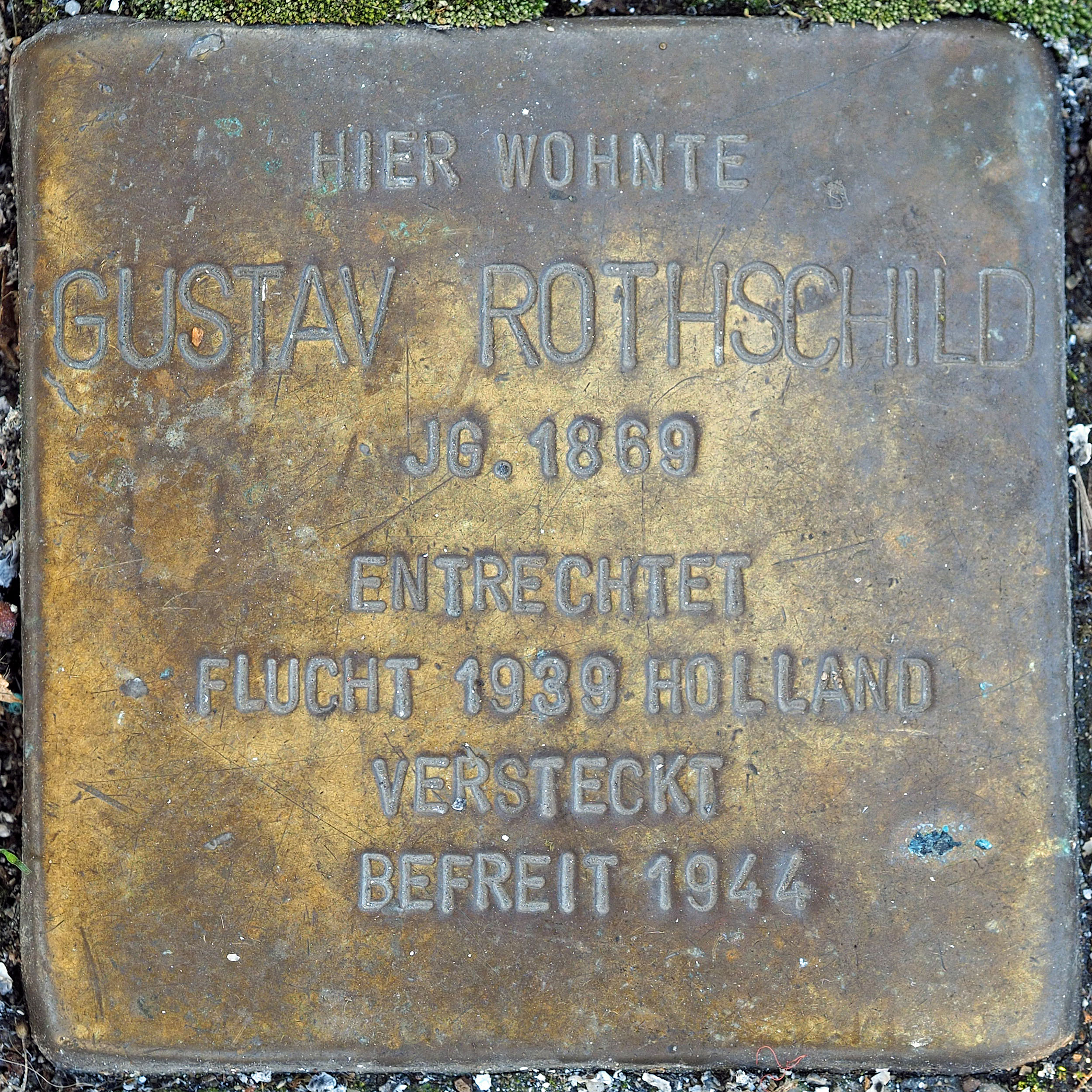 Stolperstein DU 292: Rothschild, Gustav